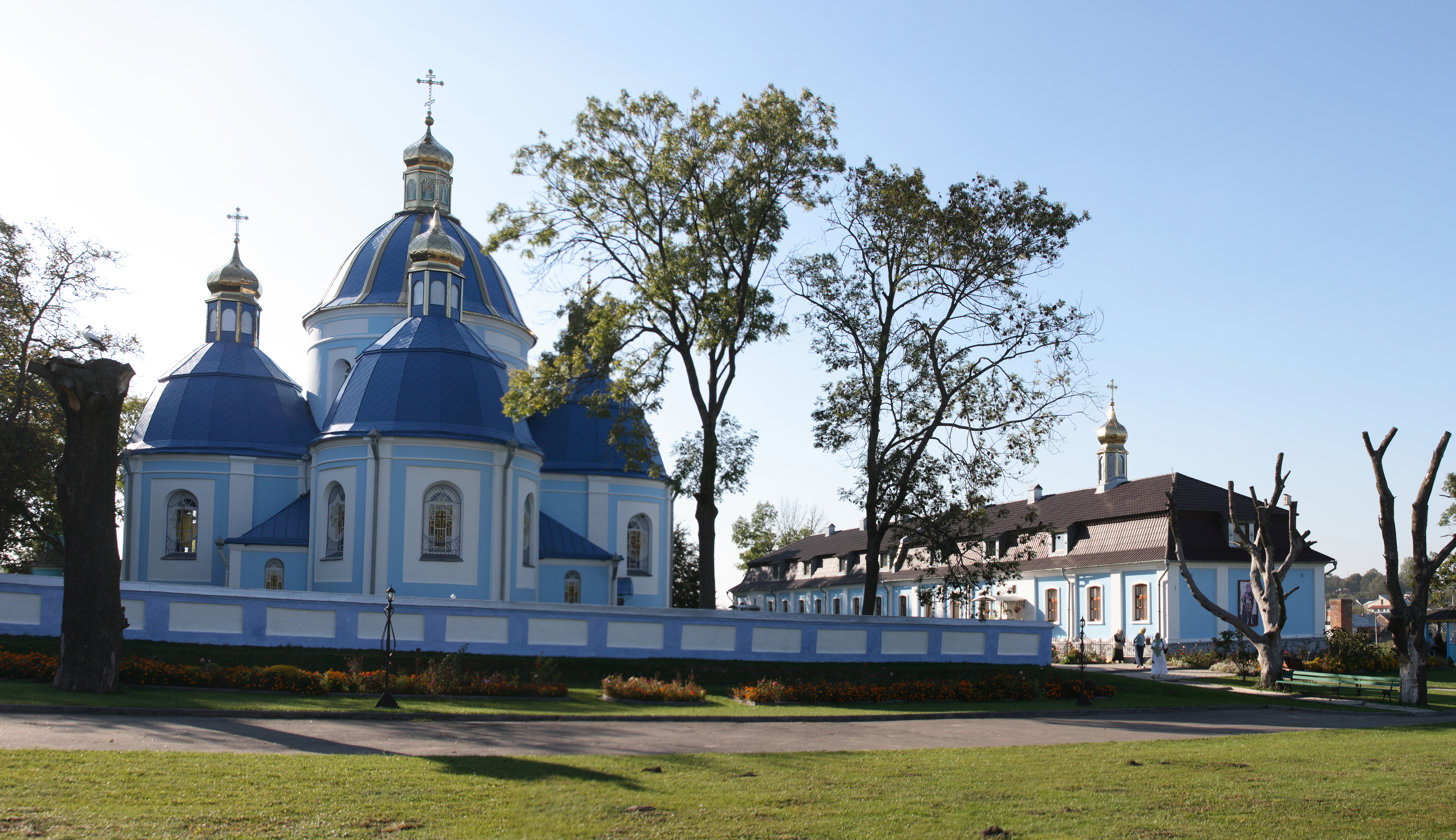 Monaster w Niskieniczach